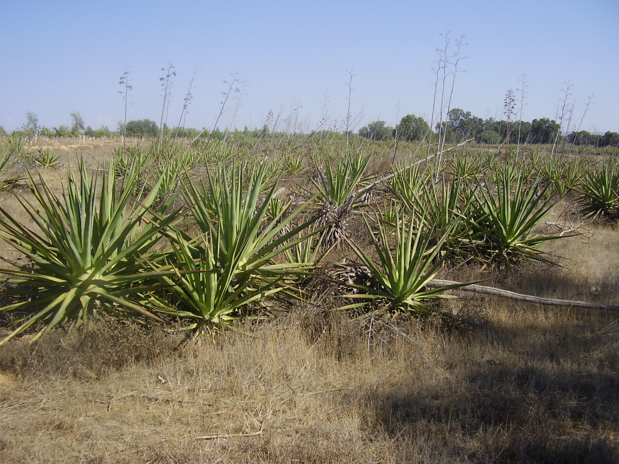 שרידי נטיעות אגבה בנגב המערבי